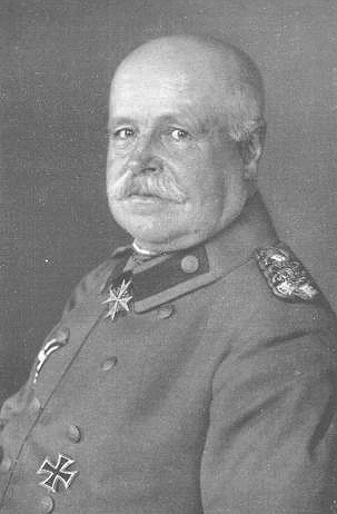 Emil Gottfried Hermann von Eichhorn